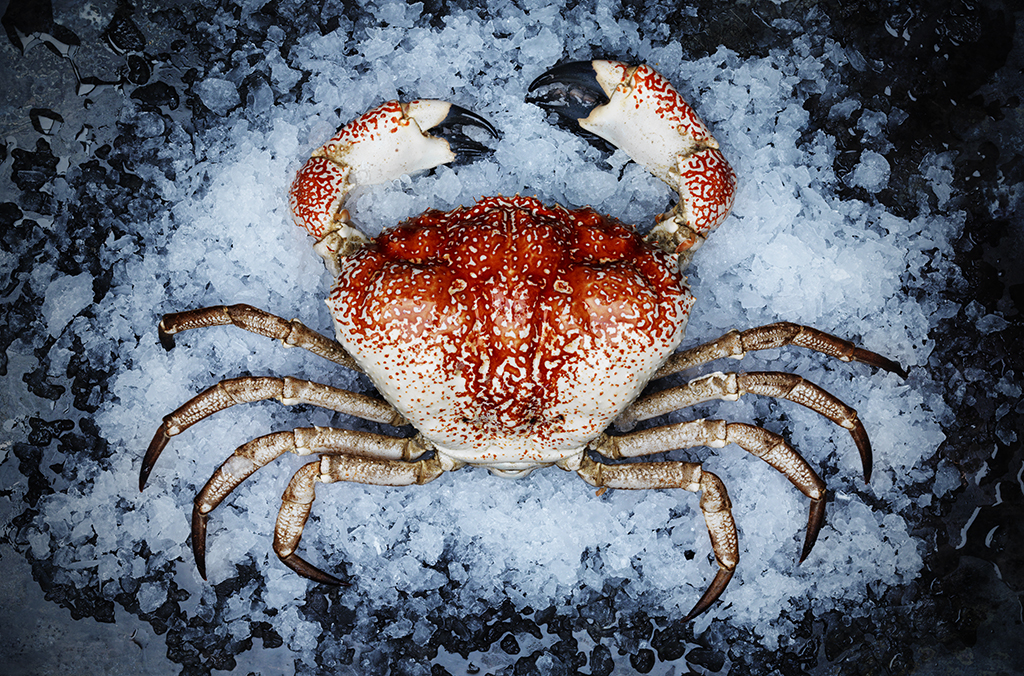 Cua Tasmania là loại cua biển khổng lồ lớn nhất thế giới, được tìm thấy ở vùng biển phía Nam Úc.